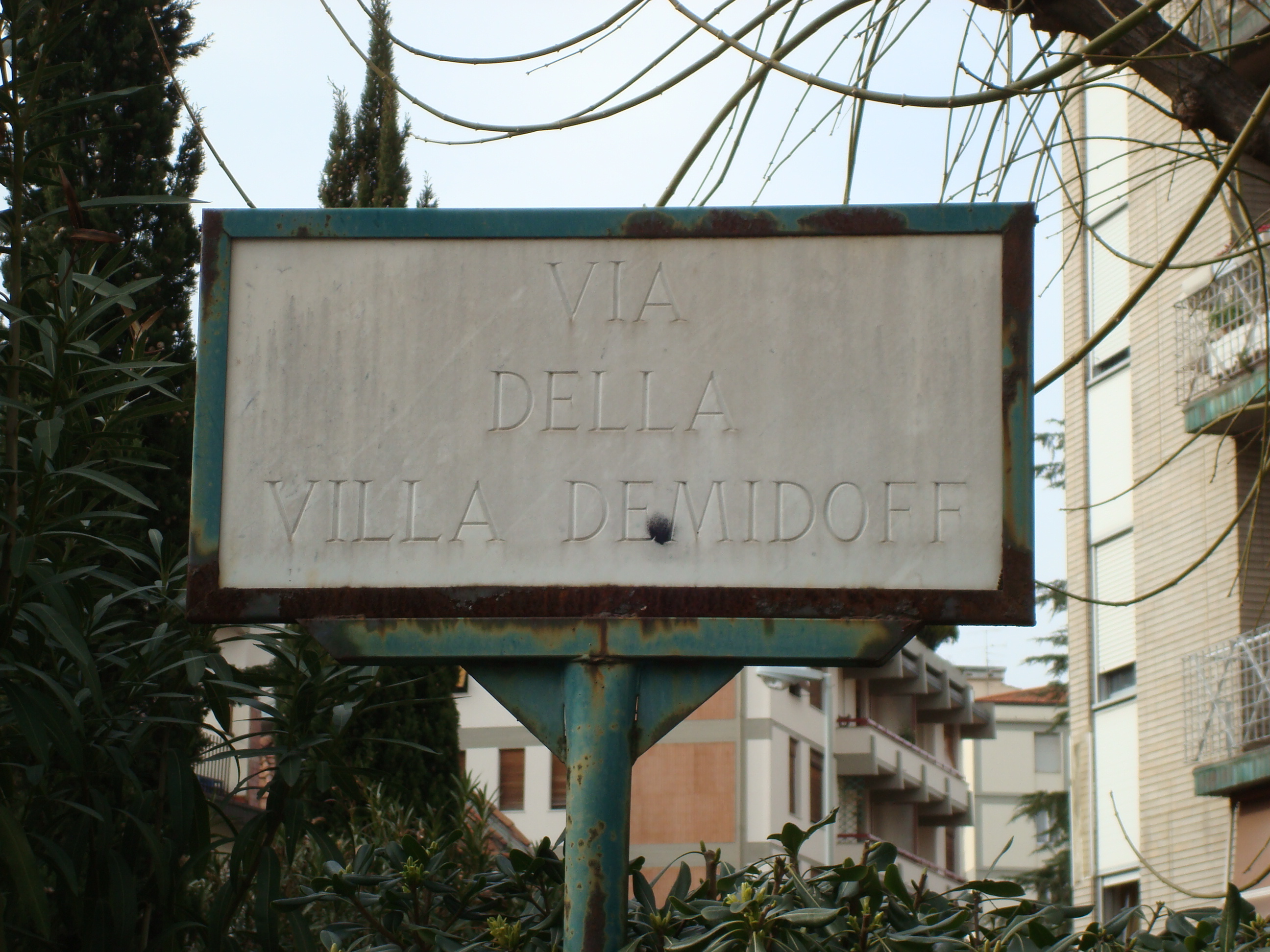 Florence, Via della Villa Demidoff, à proximité de la Villa San Donato